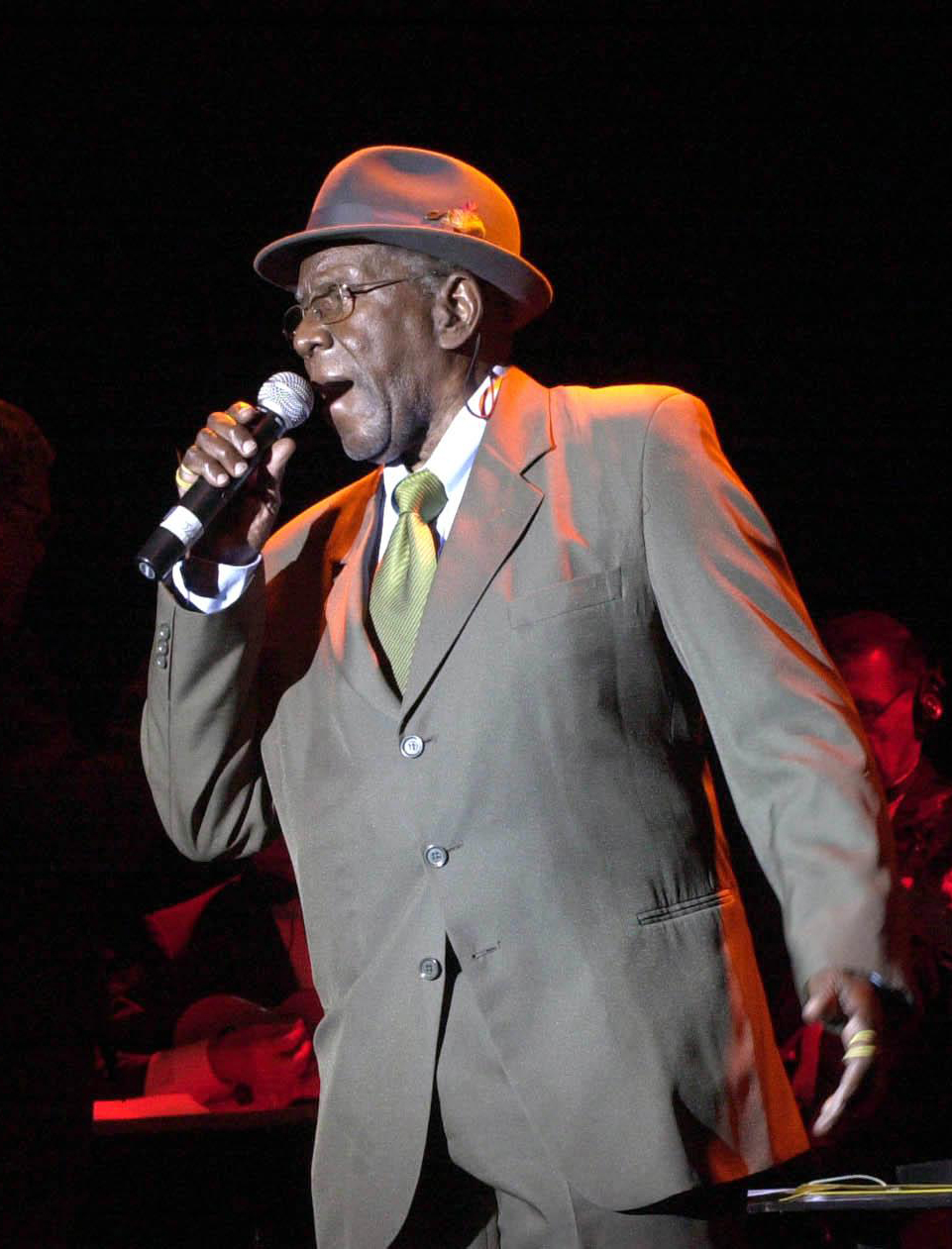 O cantor Jamelão canta durante espetáculo comemorativo na reinauguração da Nova Rádio Nacional.